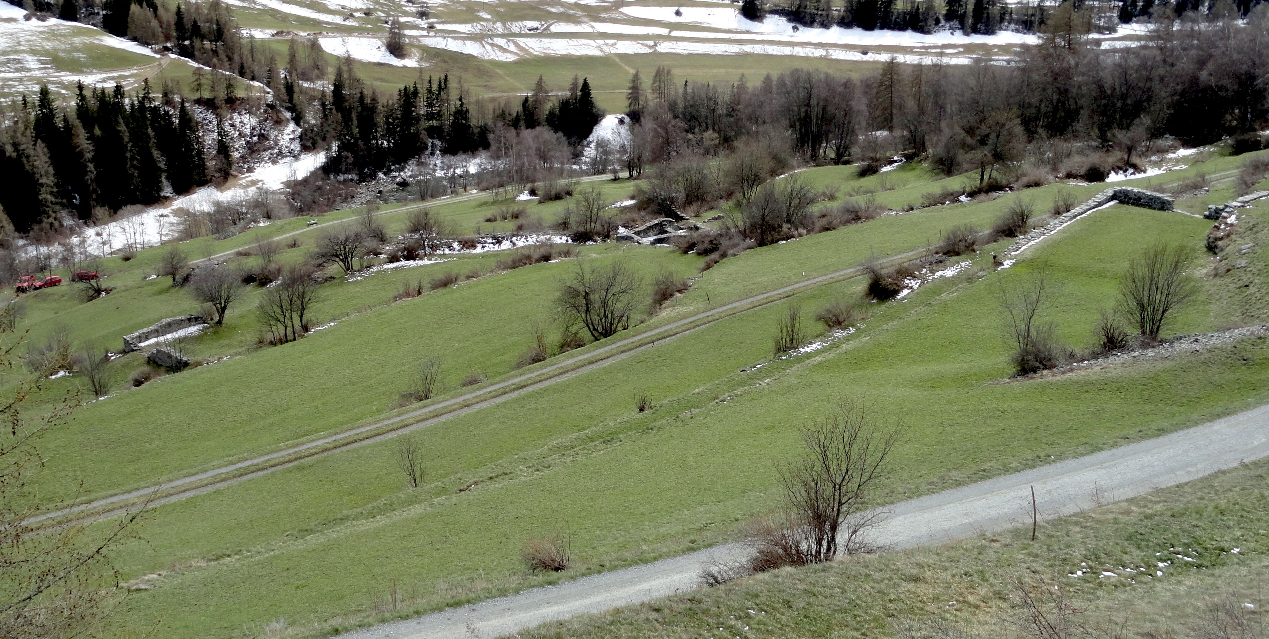 Gonda (Lavin) Gebäudereste